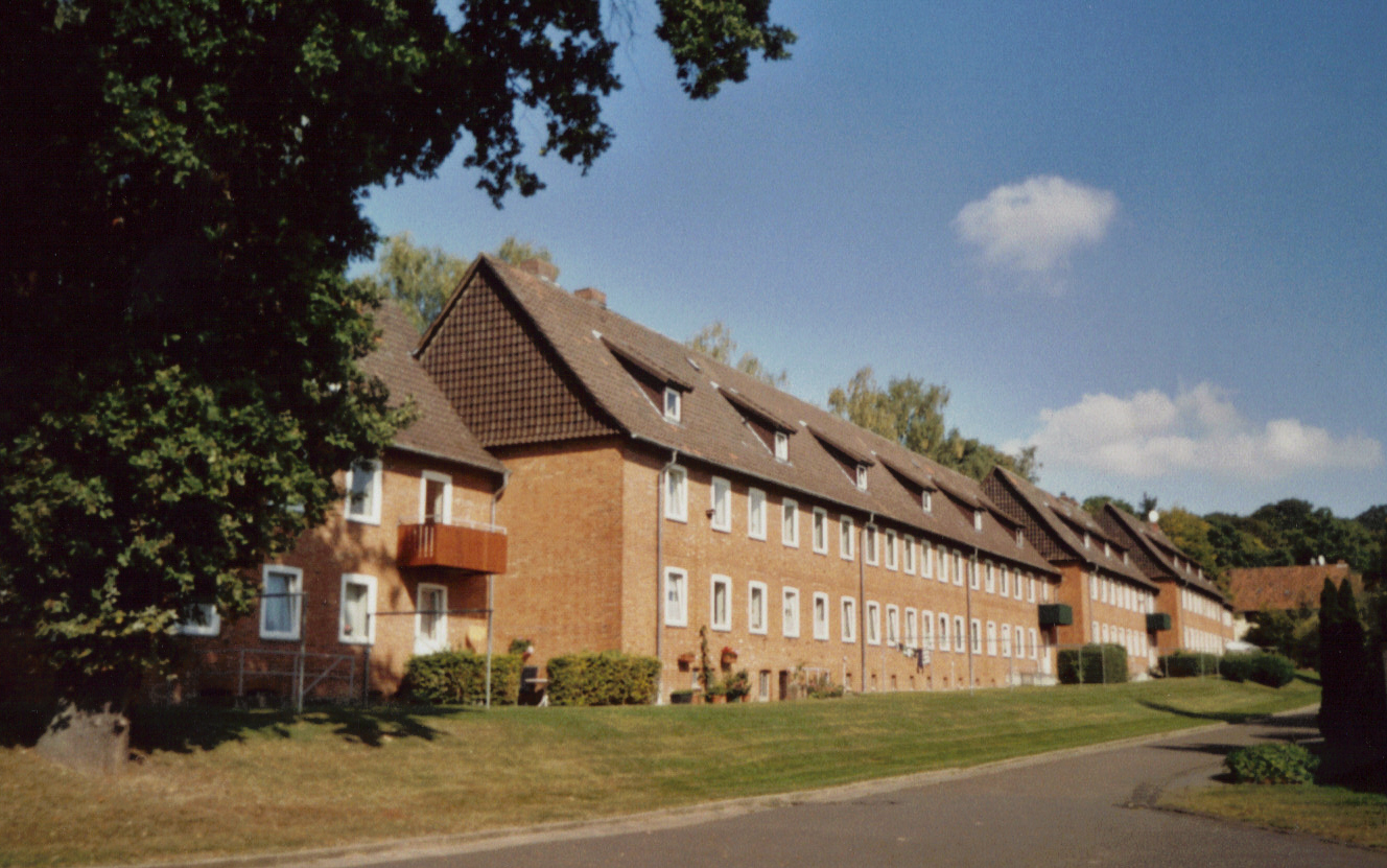 Mehrfamilienhäuser aus den vierziger Jahren, Hildesheimer Wald.